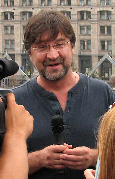 Jurij Sjevtjuk / Yuri Shevchuk / Юрий Шевчук in Kyiv, Ukraine 2007-08-14